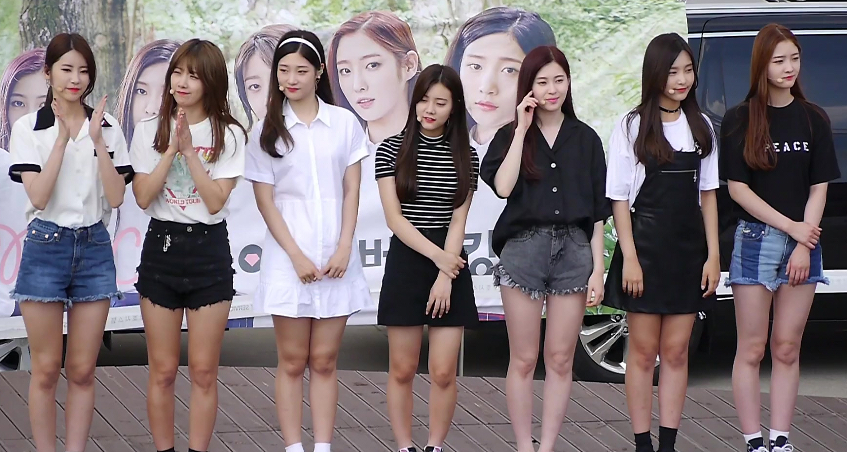 160625 다이아 여의도 버스킹 직캠 토크 왠지